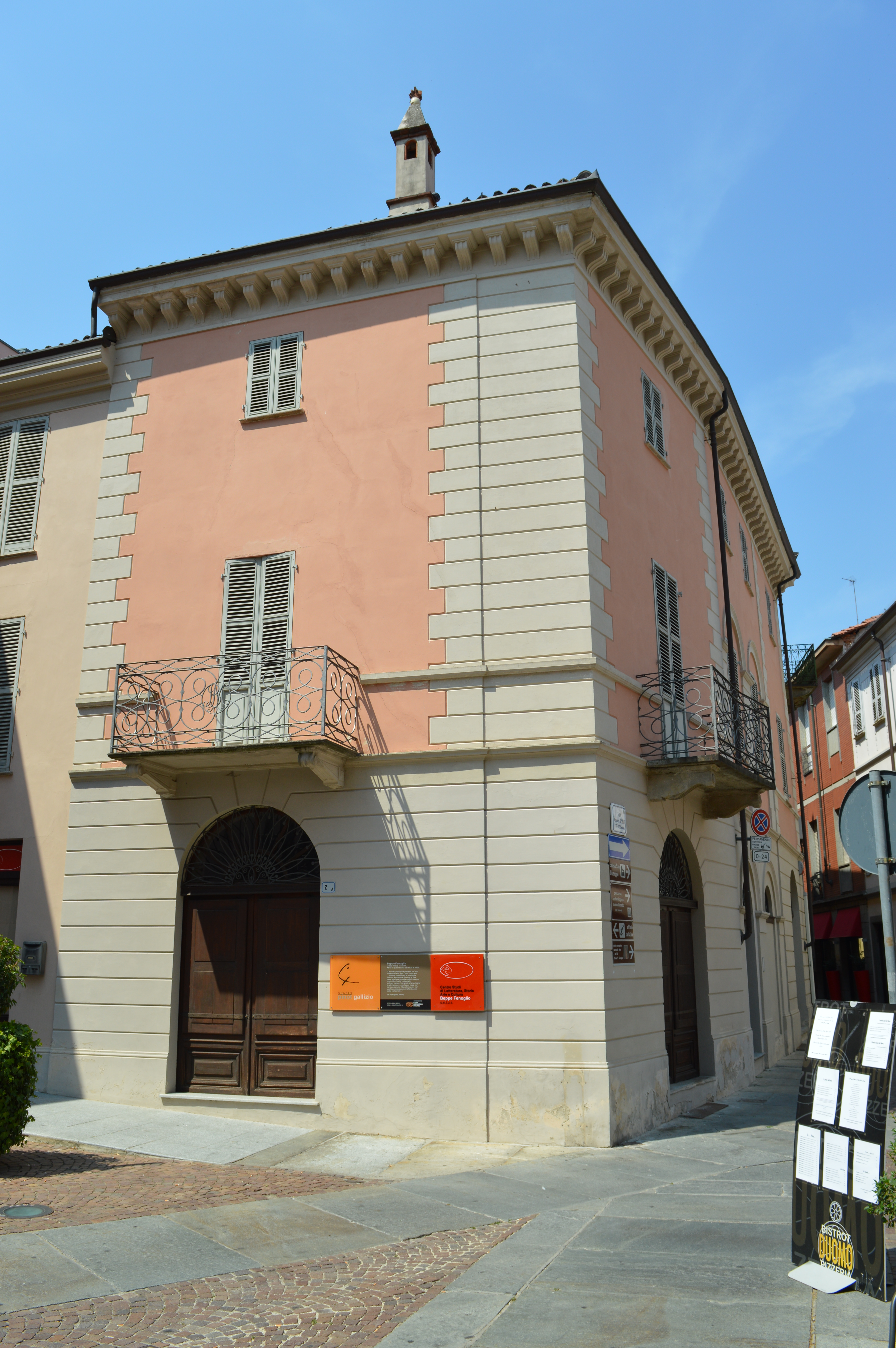 Casa dove visse Beppe Fenoglio.